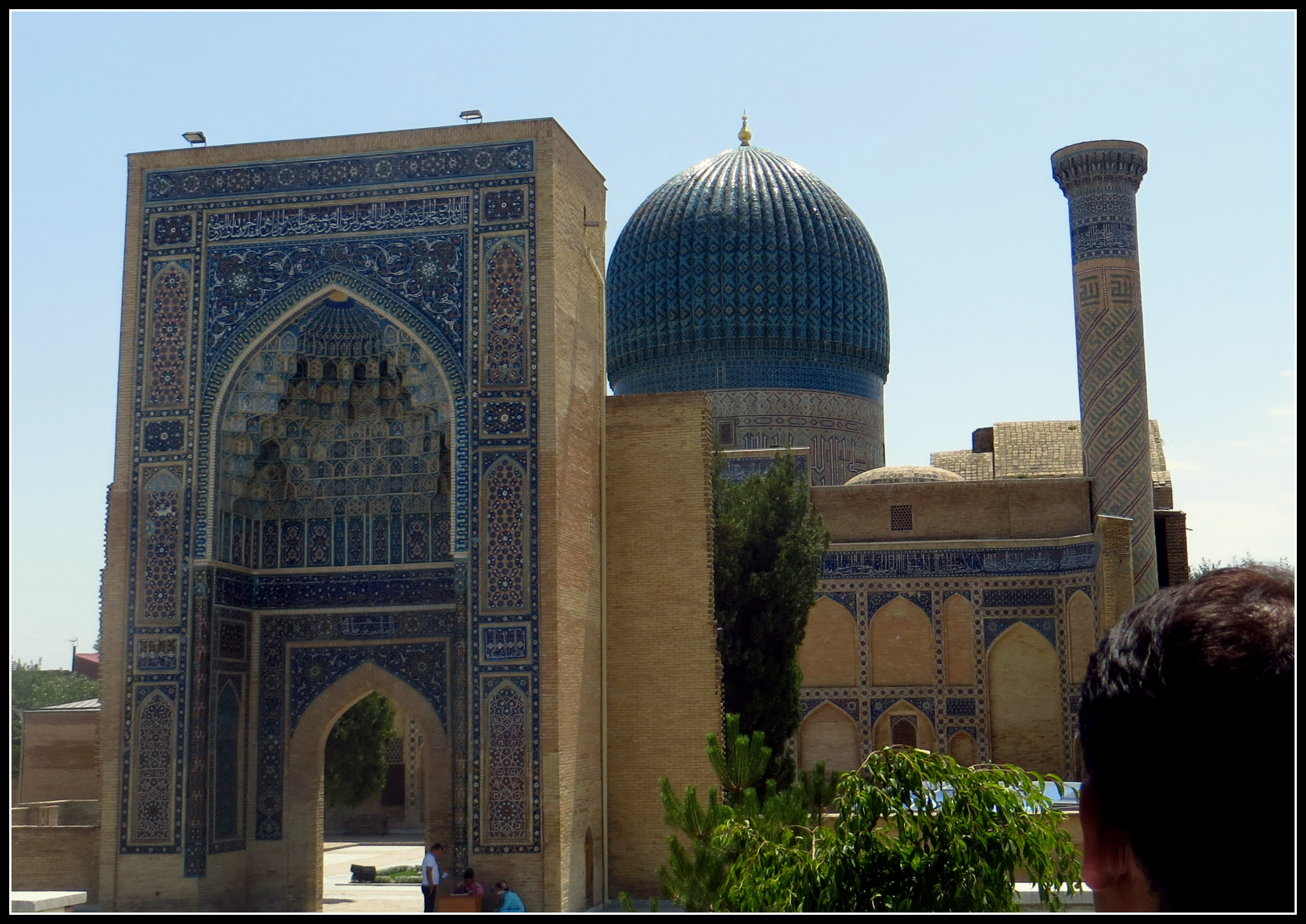 Samarkhand